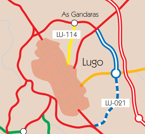 Leyenda: Rojo: Carreteras Nacionales; Rojo-Blanco: Autovías del estado; Azul-Blanco: Autopistas, Autovías y Vías de Alta Capacidad Autonómicas; Azul-blanco (con guiones): Futura carretera o ampliación.